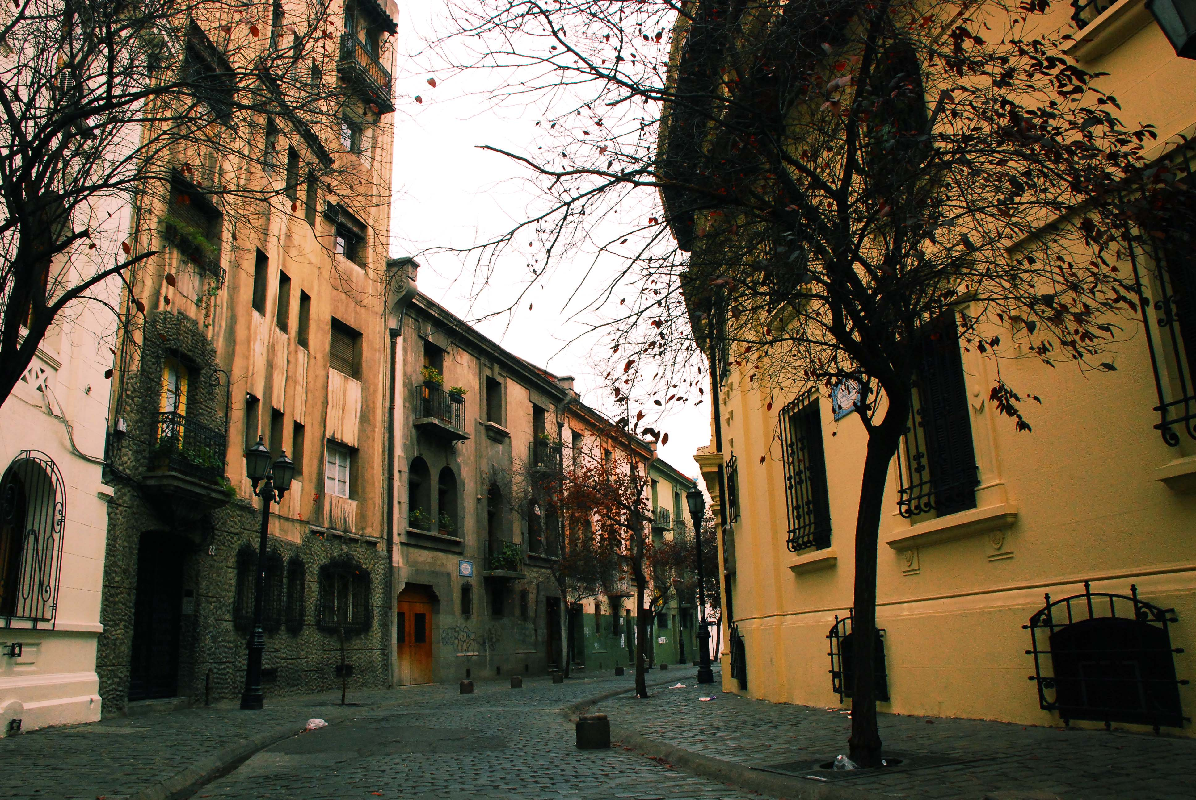 Barrio París-Londres, Santiago de Chile.